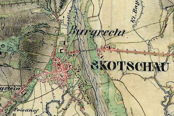 Skotschau